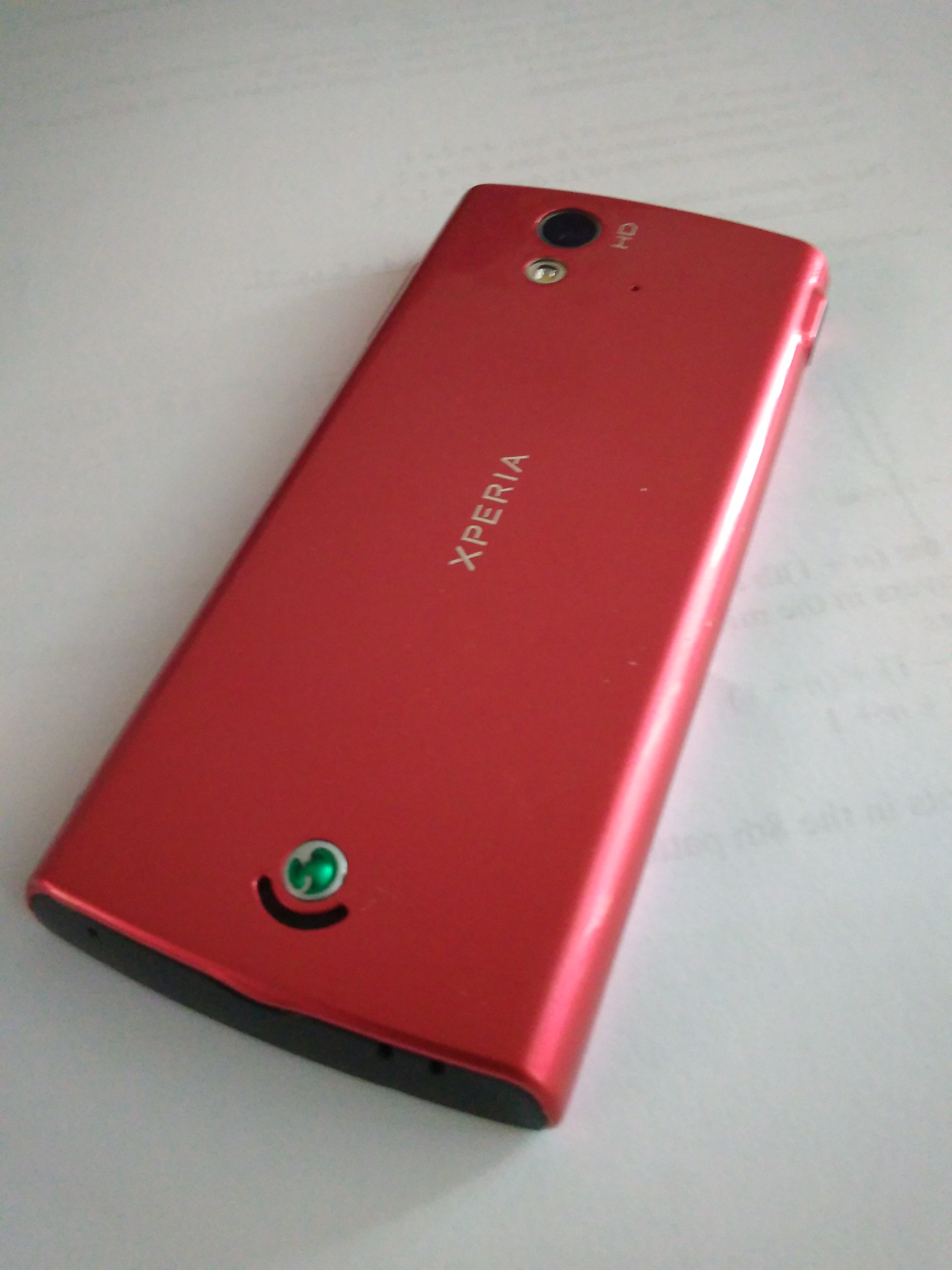 反